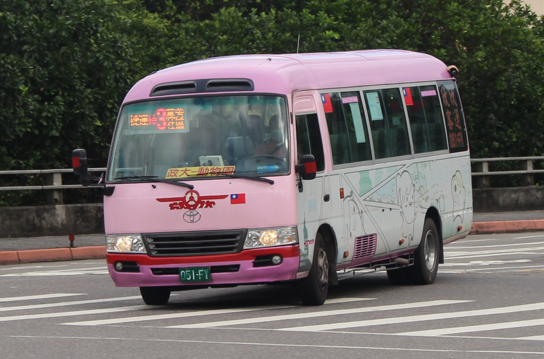 欣欣客運 051-FY BR3